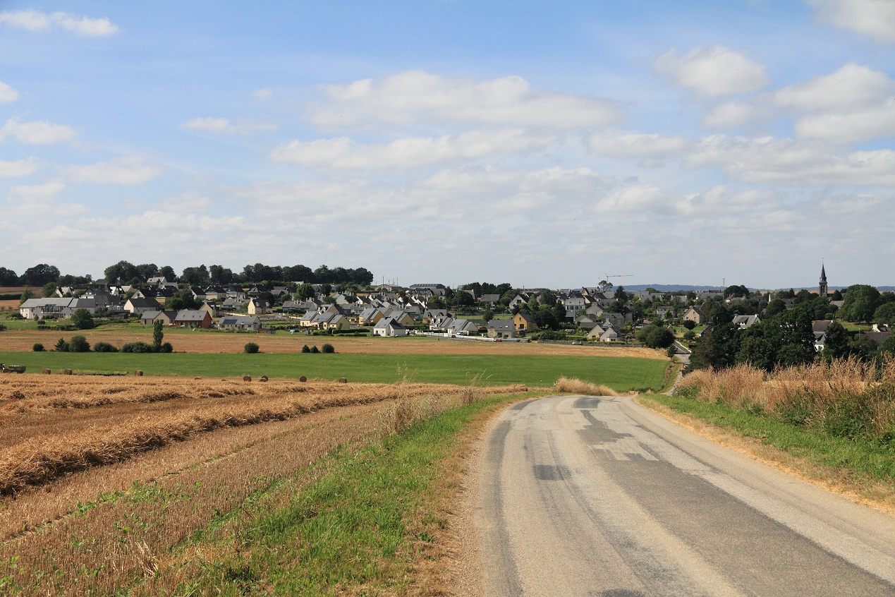 La commune d'Hémonstoir vue depuis la haut de la rue Philippe le Duc en juillet 2012, Bretagne, France.